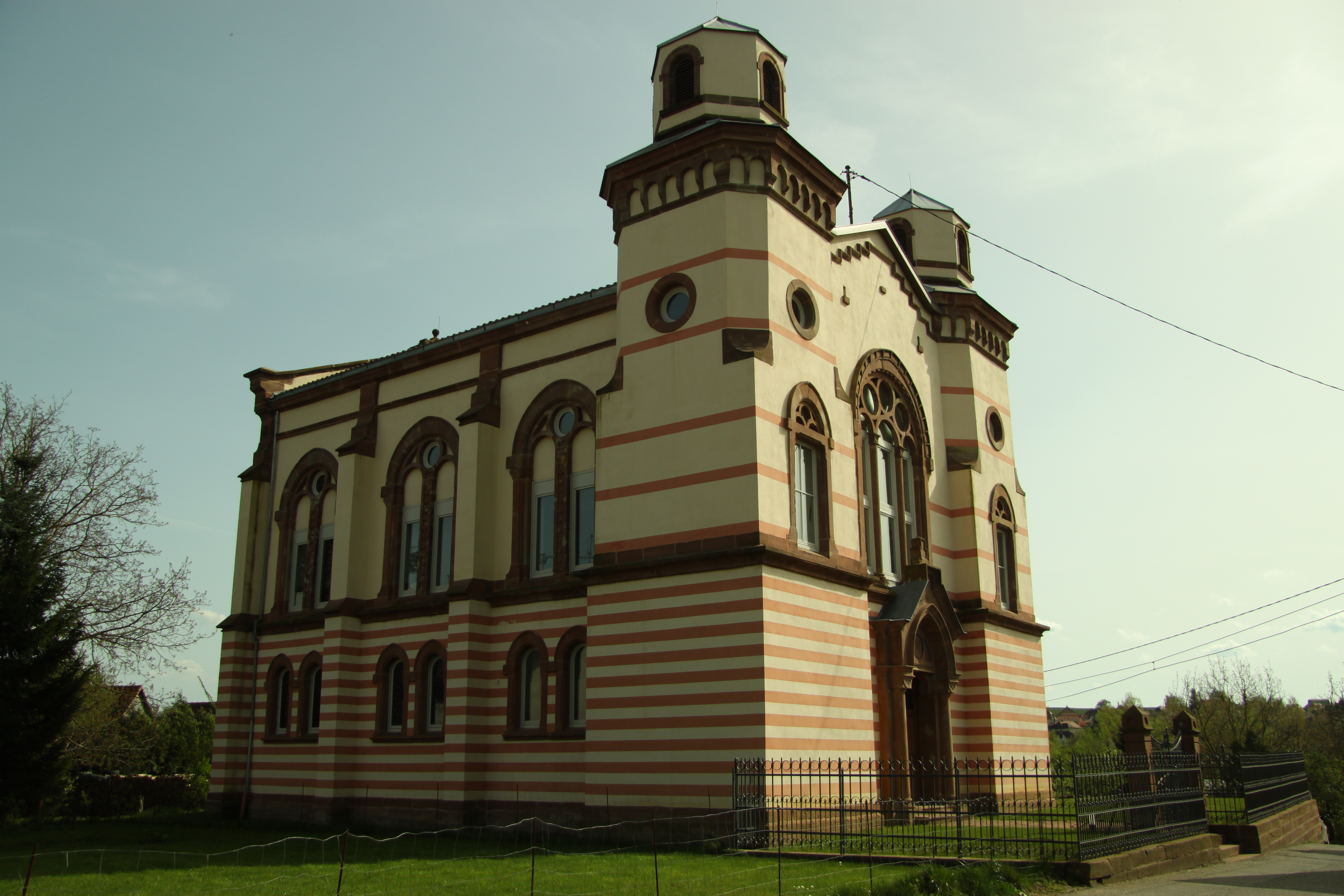 Ancienne Synagogue de Soultz-sous-Forêts